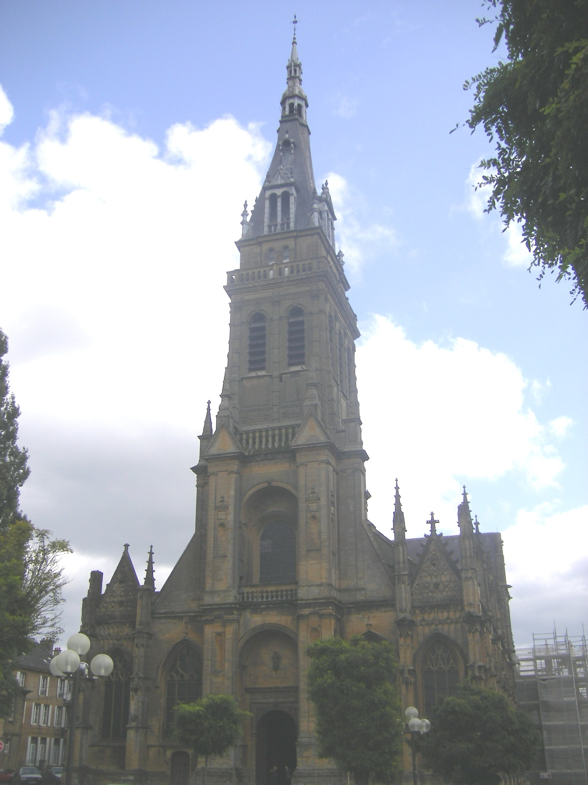 Charleville-Mézières